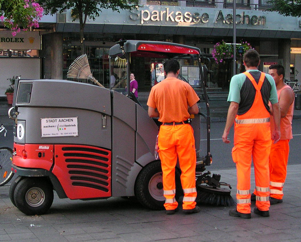 Aachen, Gehwegreiniger von HAKO Citymaster 90 vor der "Frittezang" am Friedrich-Wilhelm-Platz